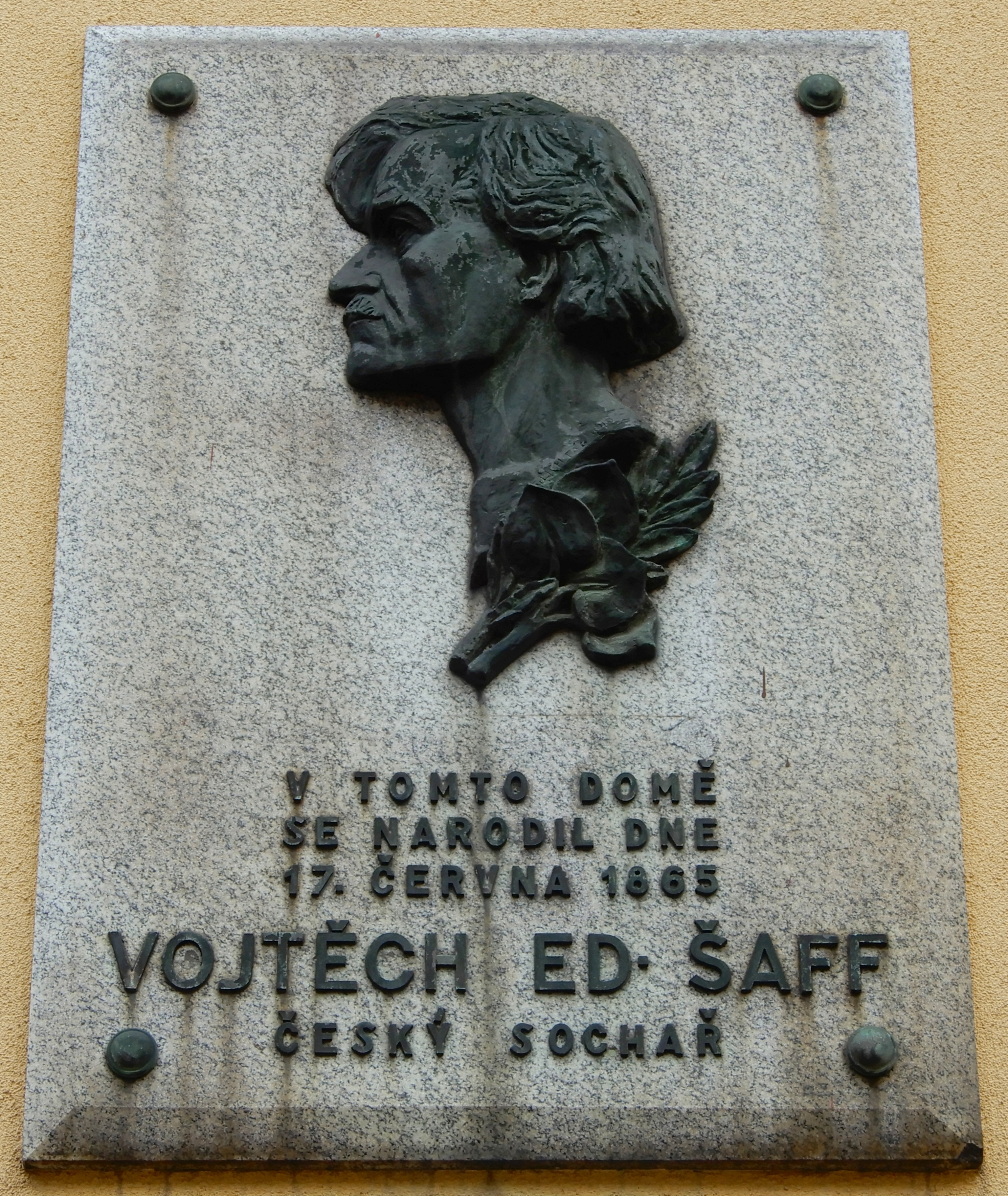 Vojtěch Eduard Šaff, pamětní deska na rodném domě v Poličce, Šaffova 107.